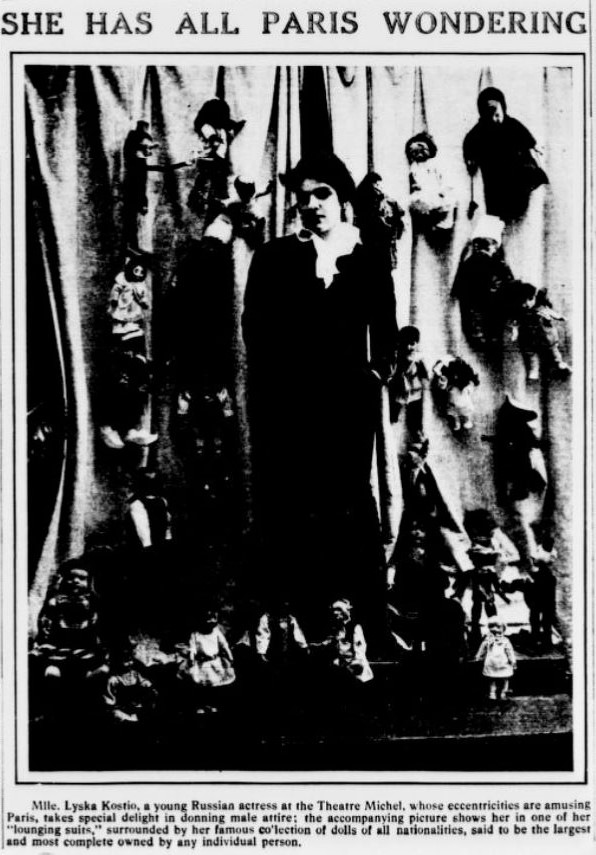 Zeitungsartikel über Kostio de War in Paris